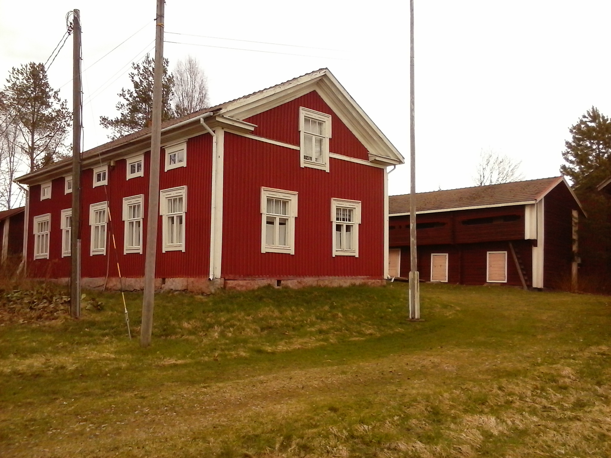 Iisakin Jussin tupa